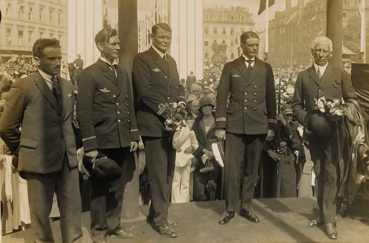 Utsnitt fra album om Amundsen-Ellsworths polflygning i 1925: «Ekspedisjonsdeltagerne på paviljongen i Oslo havn under mottagelsesseremonien - Feucht, Omdal, Riiser-Larsen, Dietrichson og Amundsen - Ellsworth er ikke kommet med på bildet». Ubeskåret bilde opplastet 2011.